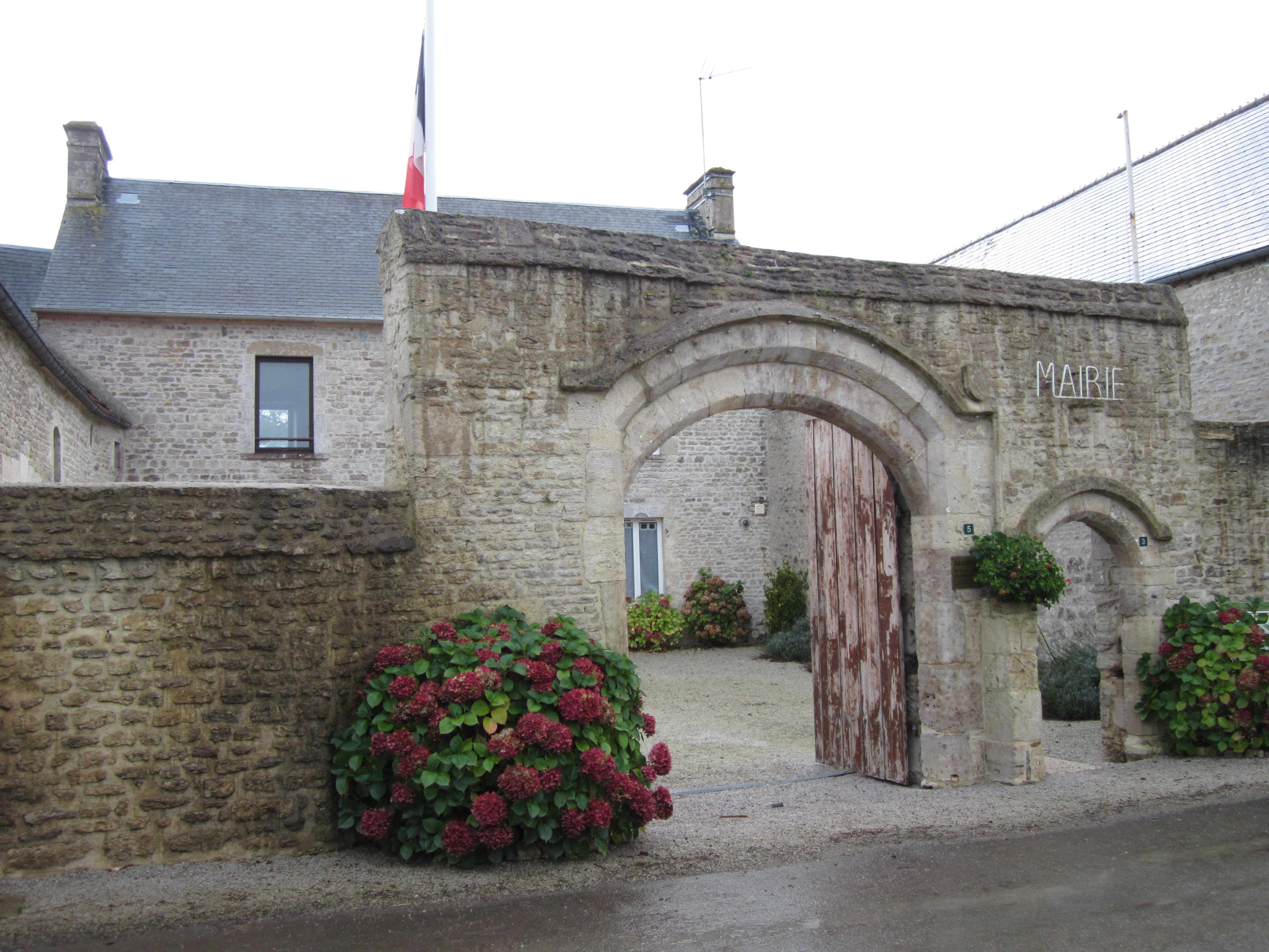 Église Saint-Pierre du Le Ham (Manche)